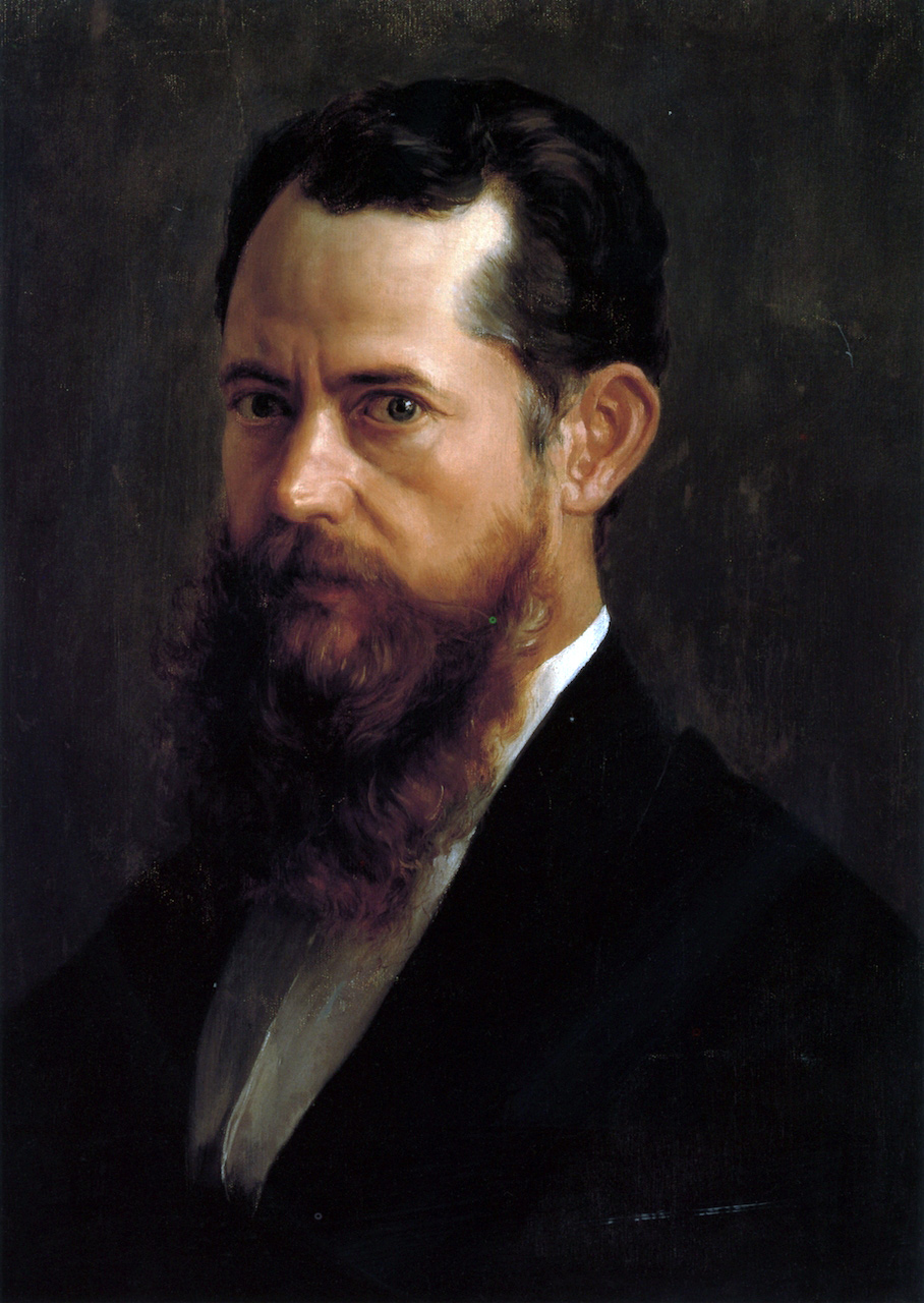 Autorretrato de José María Velasco